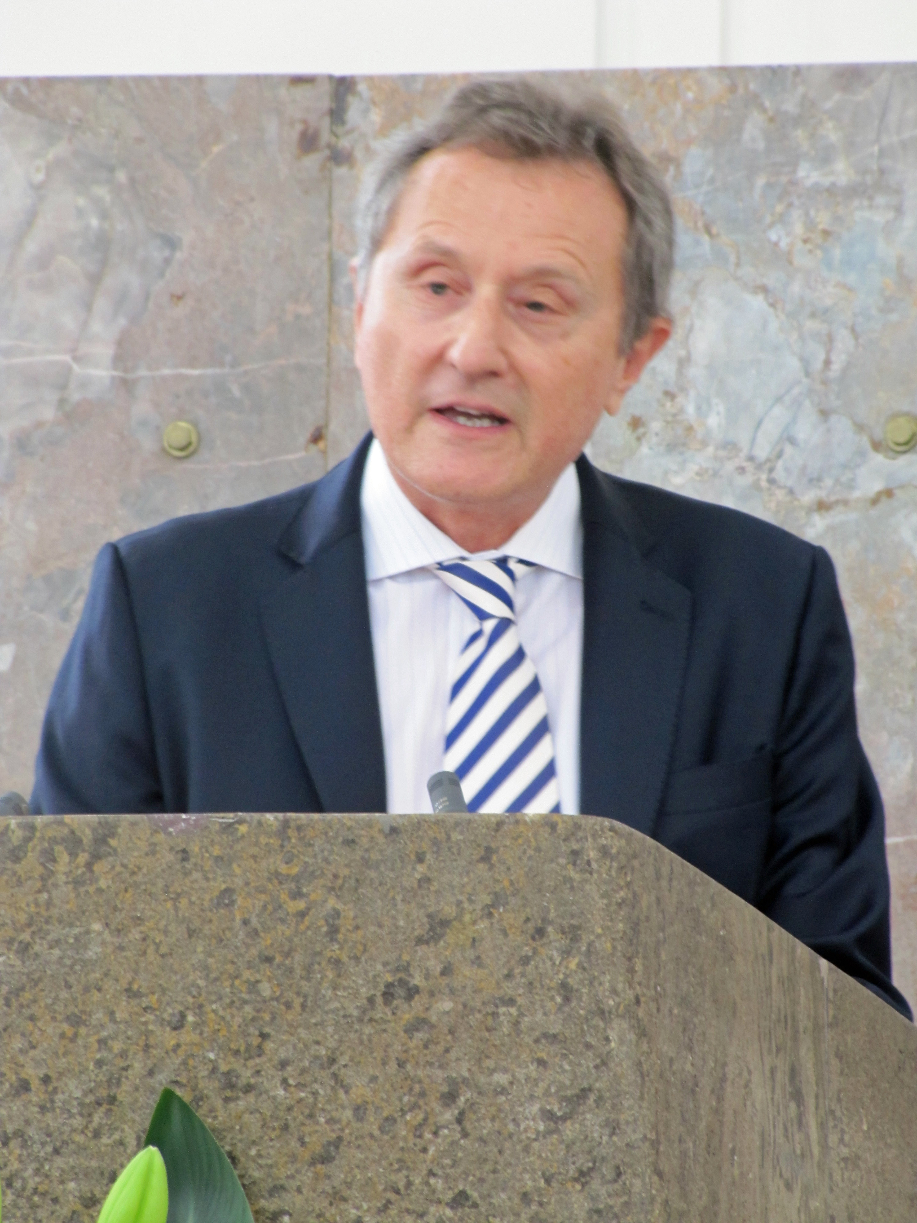 Michael A. Gotthelf bei seiner Begrüßungsrede zur Verleihung des Ludwig-Börne-Preises an Souad Mekhennet, am 27. Mai 2018 in der Frankfurter Paulskirche.